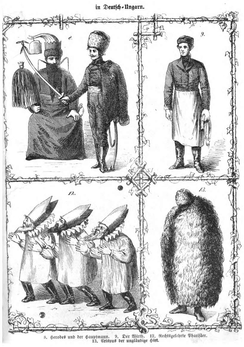 Weihnachtsspiele der Deutschen in Ungarn; 8. Herodes und der Hauptmann, 9. Der Wirth, 12. Rechtsgelehrte Pharisäer, 13. Crispus der ungläubige Hirt